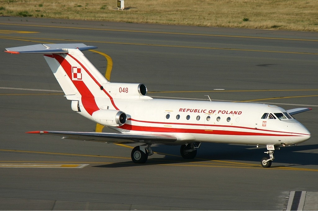 Polish Air Force Yakovlev Yak-40